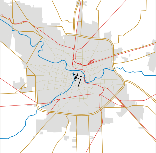 Vías selectivas del transporte público de la ciudad.